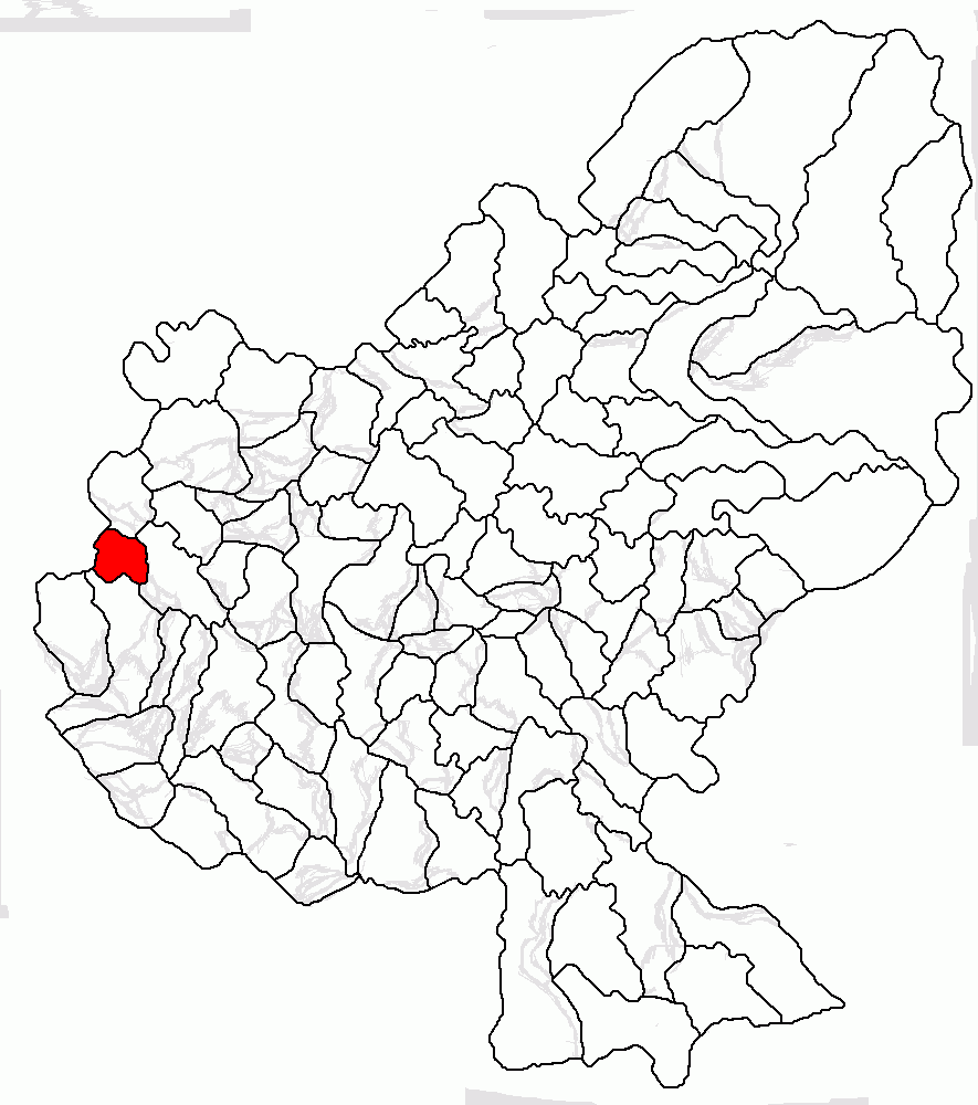 Categorie:Hărţi ale judeţului Mureş